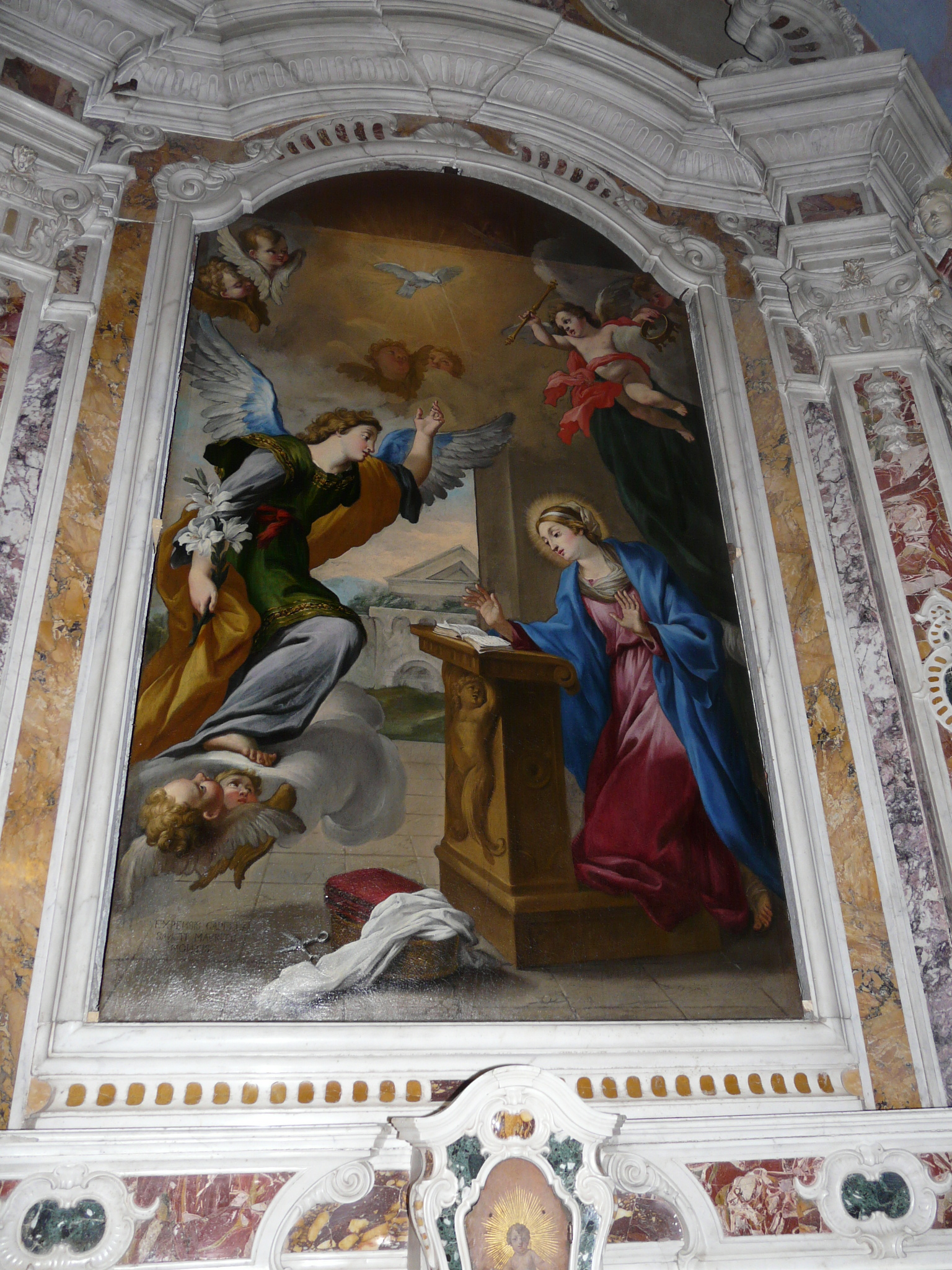 Dipinto del pittore Giovanni Battista Carlone (L'Annunciazione), Santuario di Nostra Signora di Montallegro, Rapallo, Liguria, Italia